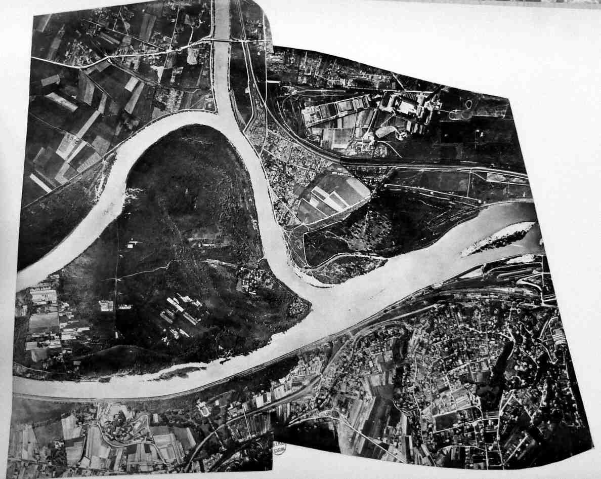 Le haut de la photo est le Sud, le bas le Nord, à gauche, l'Est et à droite, l'Ouest. Le canal de Miribel, le vieux Rhône, le canal de Jonage se rejoignent à l'amont de Lyon. Paysage de banlieue immédiate. Au Nord, la rive droite du Rhône (Crépieu, Vassieu et le début de Saint-Clair), au sud on remarque la poussée d'un autre type de banlieue, celle de Villeurbanne, uniquement industrielle. Les groupes de maisons sont disposés de chaque coté de la route de Vaulx-en-Velin ; on voit même l'empiètement de cette banlieue ouvrière sur les iles broussailleuses. Vers l'angle sud-ouest on peut remarquer le poste radio-télégraphique de la Doua et la digue qui protège Lyon contre les débordement du Rhône.